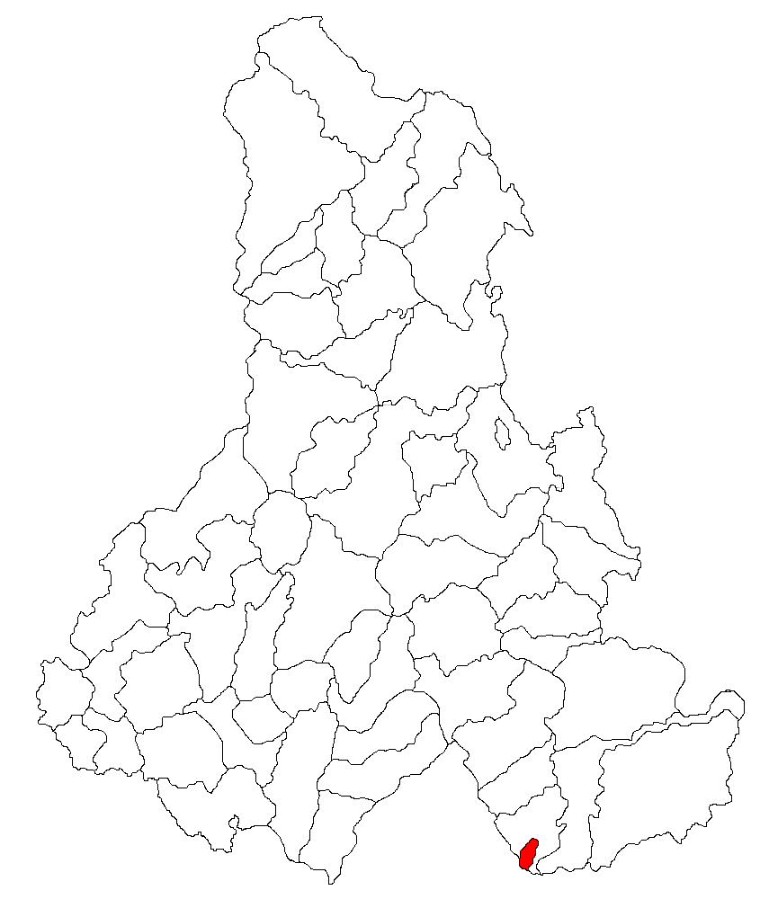 Categorie:Hărţi ale judeţului Harghita